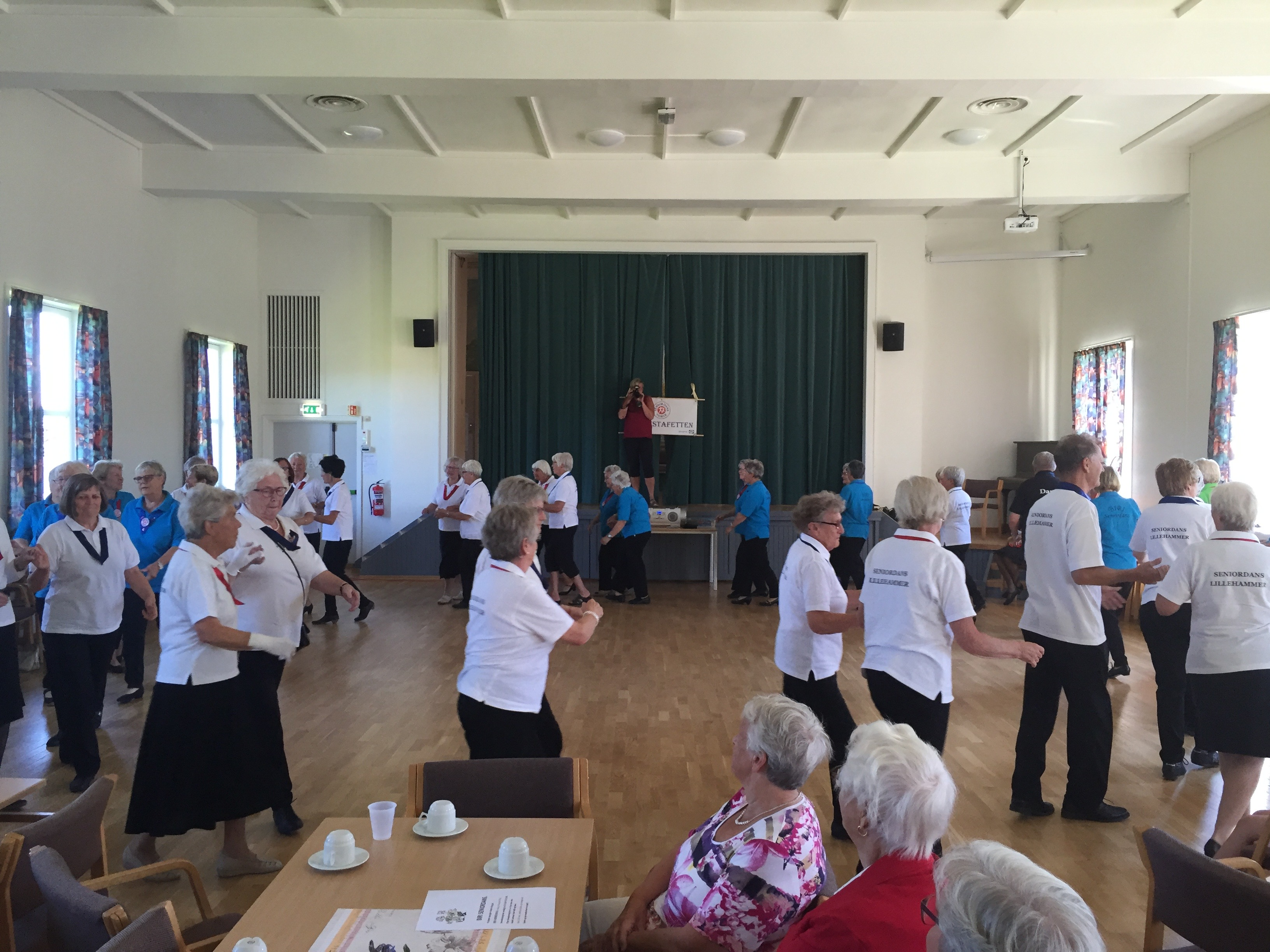 Seniordans, gruppe eldre mennesker som danser.